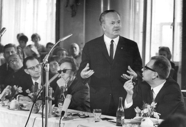 Zentralbild Simmering 20.10.1966 Zur Vorbereitung der Jahrestagung des Deutschen Schriftstellerverbandes Literaturgespräch in Magdeburg Bei der Darstellung des Menschenbildes unserer Zeit in der Literatur gehe es darum, die Homogenität in der DDR zu zeigen und nicht darum, ein "oben und ein unten" zu konstruieren, betonte das Mitglied des ZK der SED und ein Sekretär des Staatsrats, der Schriftsteller Otto Gotsche (stehend), auf dem traditionellen Mittwochgespräch des Deutschen Kulturbundes in Magdeburg, dem sich diesmal als Veranstalter der Deutsche Schriftstellerverband angeschlossen hatte. In Vorbereitung der Jahreskonferenz des Deutschen Schriftstellerverbandes diskutierten namhafte Schriftsteller mit Lesern, Bibliothekaren und Literaturkritikern über das Thema "Literatur und Menschenbild in unserer Zeit". Zu den Gesprächspartnern gehörten auch die Schriftsteller Bernhard Seeger, Fritz Selbmann, Jürgen Brinkmann, Helmut Preissler und Dr. Christa Johannsen.